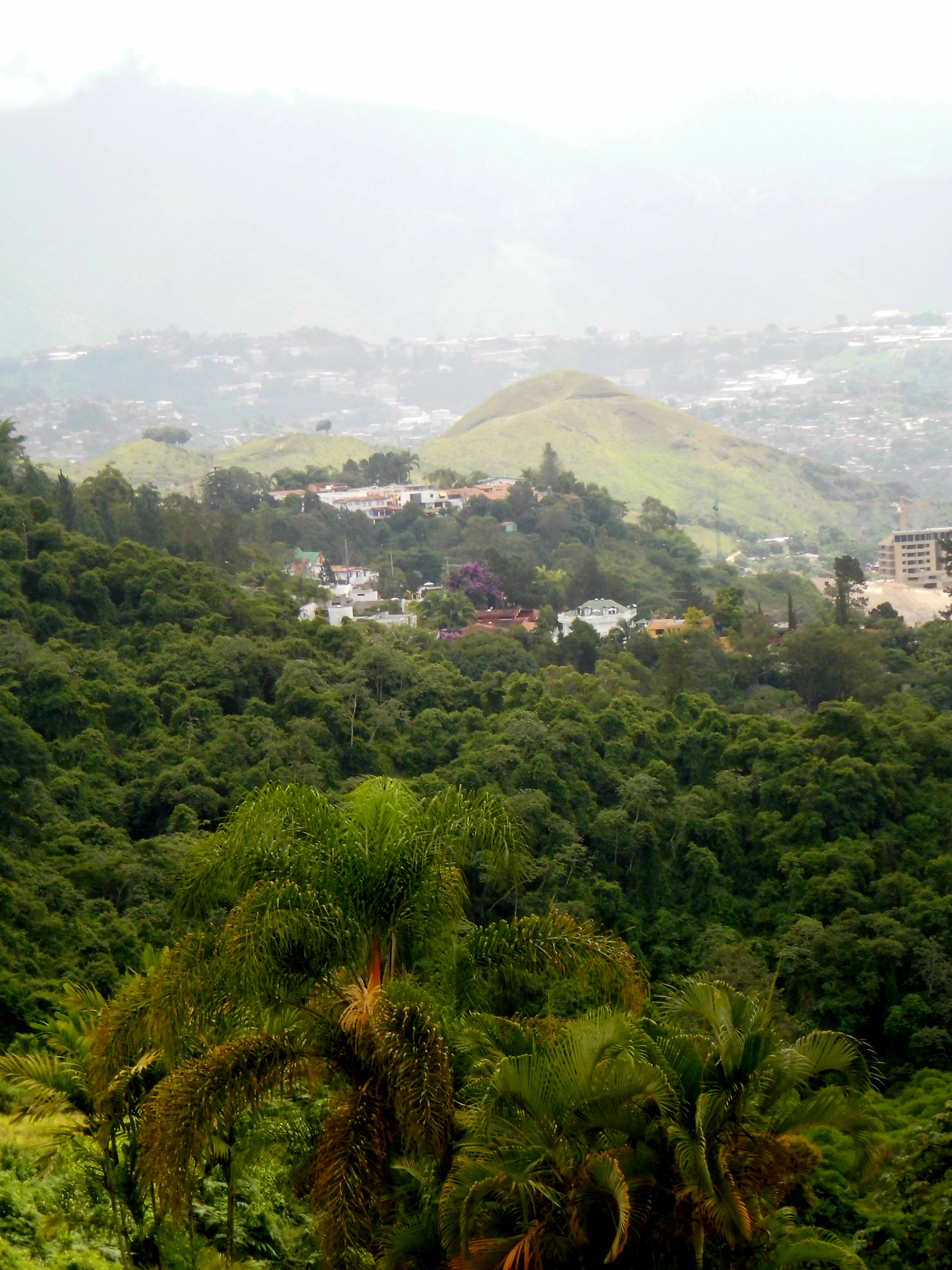 Peñon de Las Guacas al este del municipio El Hatillo, estado Miranda - Venezuela